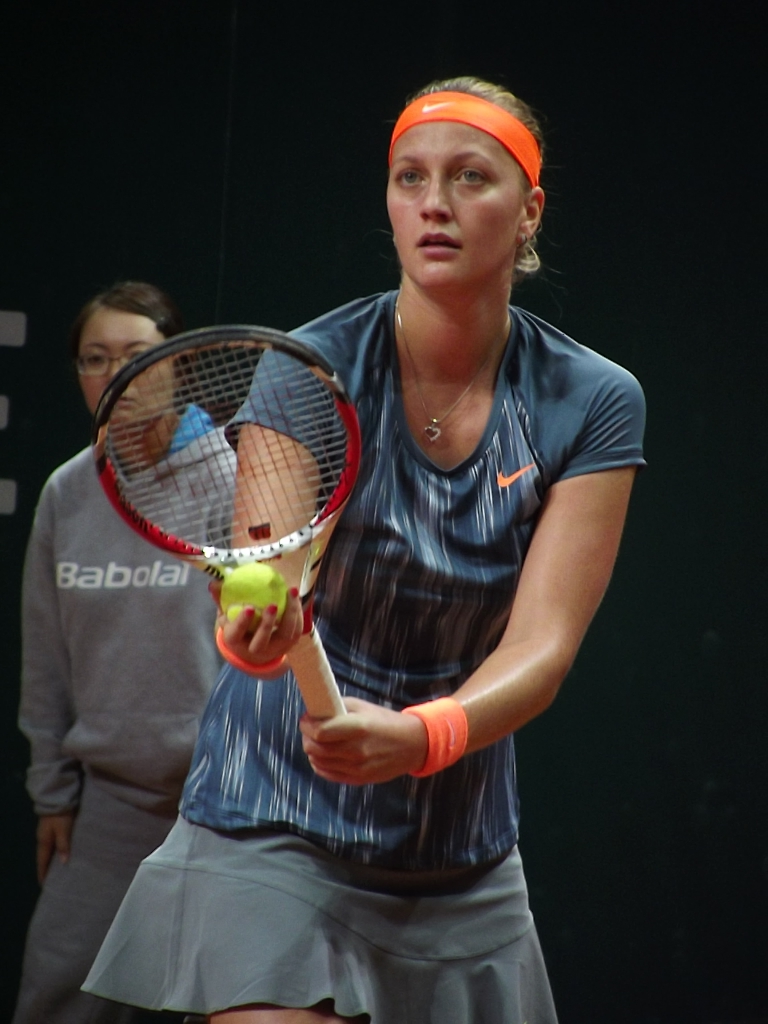 Zdjęcie zrobione podczas kobiecego turnieju tenisowego BNP Paribas Katowice Open, w katowickim Spodku.